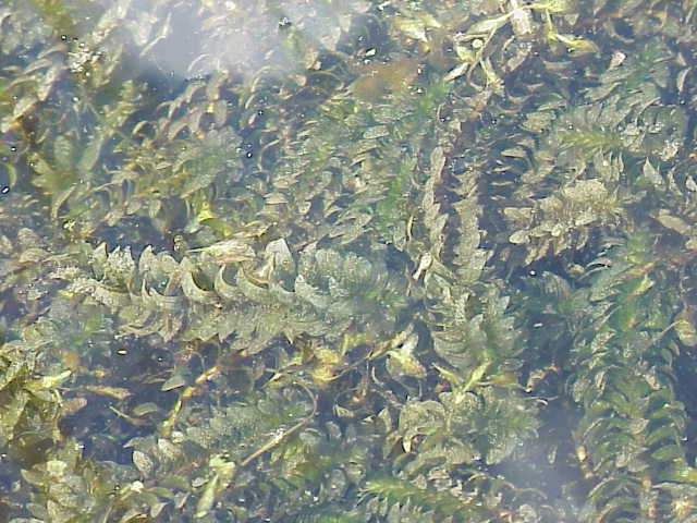 Species: Elodea nuttalii Family: Hydrocharitaceae Image No. 1